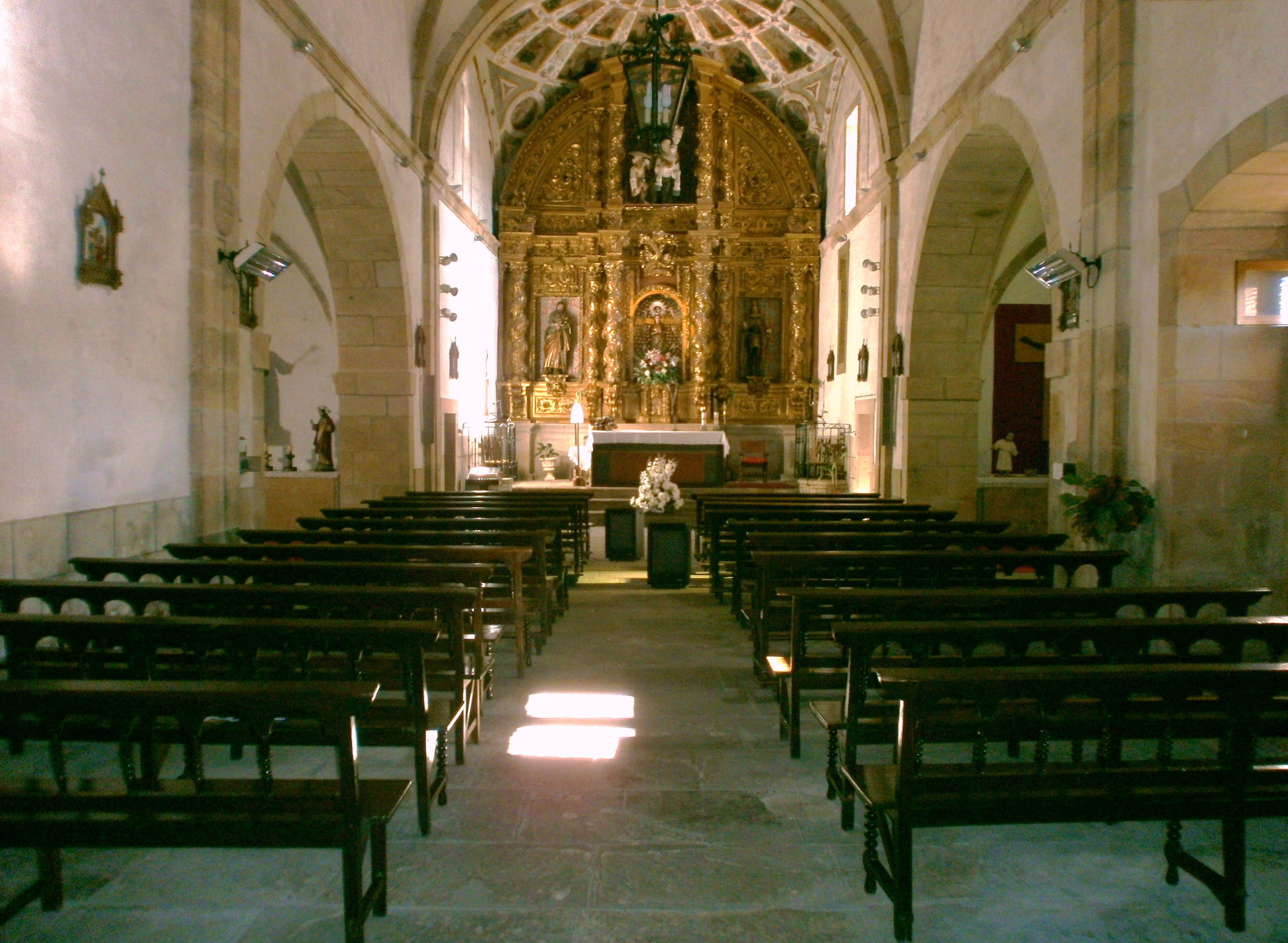 Interior del templo